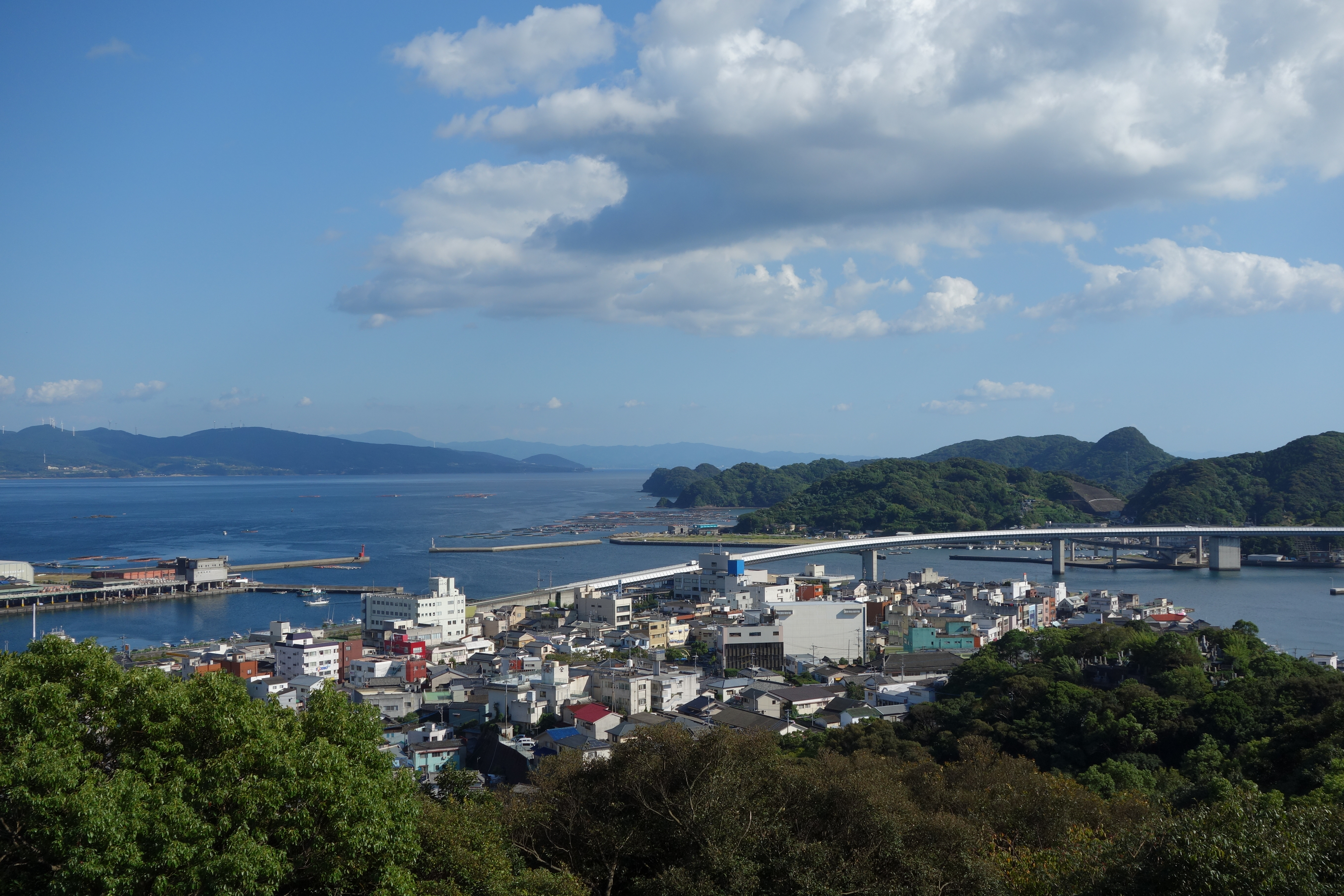 うしぶか公園からハイヤ大橋